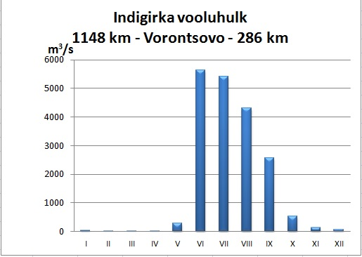 EidemillerJoe Indigirka